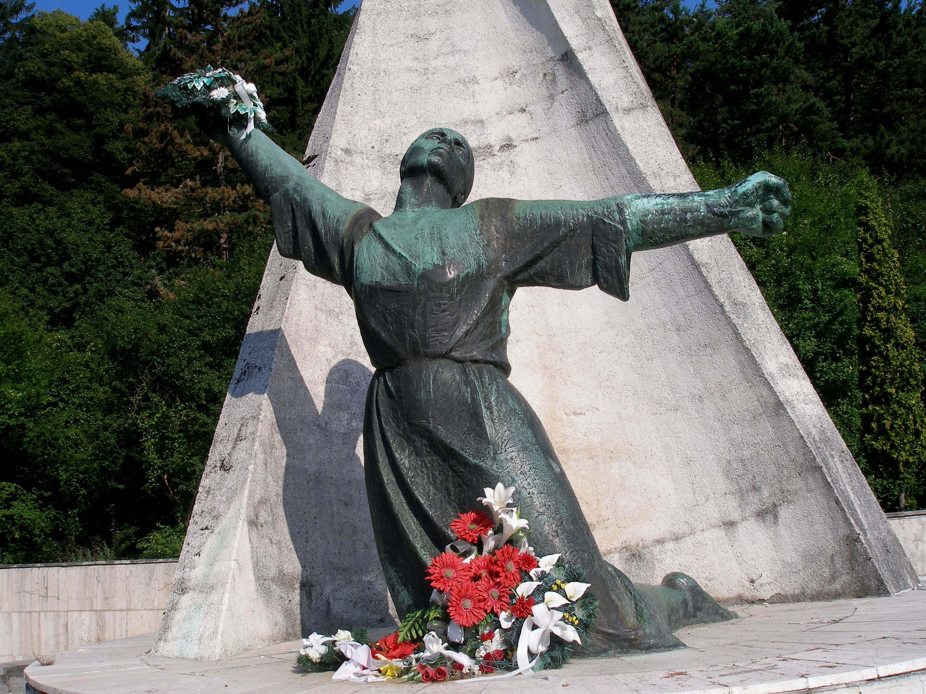 Podľa projektu architektov A. Béllu, E. Stančíka, M. Belluša a akademických sochárov K. Patakiovej a A. Viku bol obetiam fašistických represálií postavený pomník - Pamätník SNP Nemecká. Autorkou sochy je akademická sochárka Klára Pataki. (nar. 14. mája 1930 Šahy) Bronzová socha ženy bola vytvorená v roku 1959.